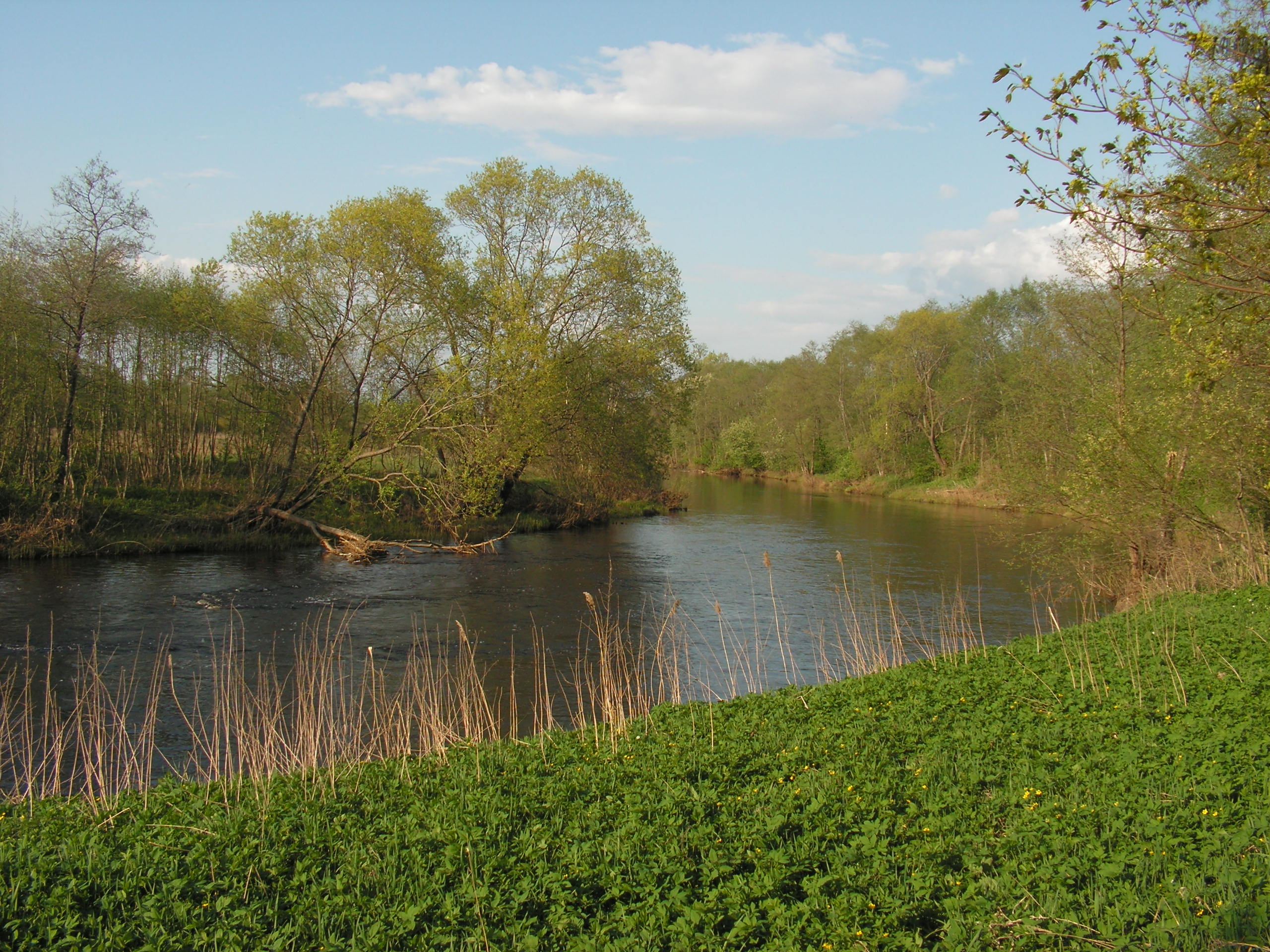 Река Исса в деревне Шлёпиха